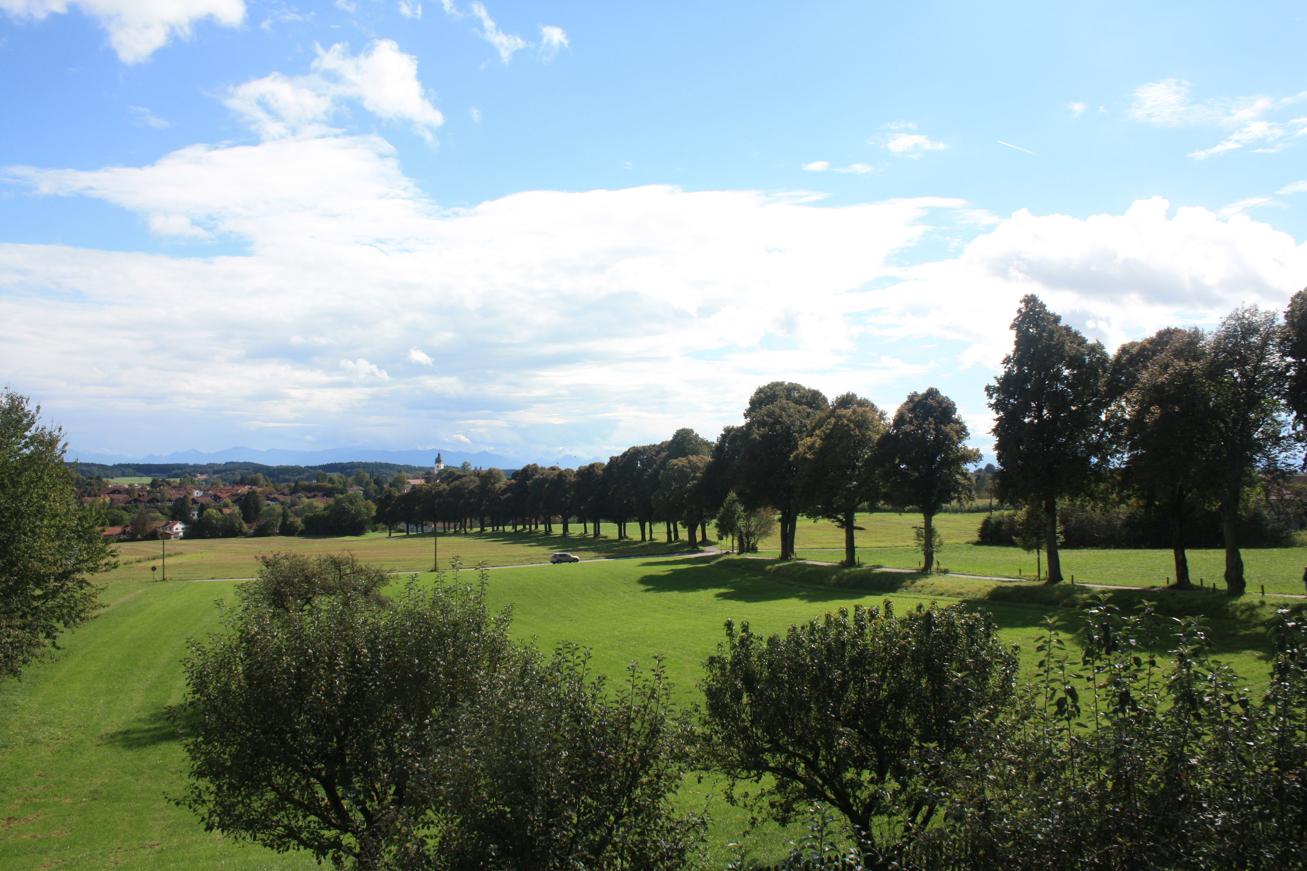 Heldenallee Ebersberg, Mahnmal für die Gefallenen der Stadt im Ersten Weltkrieg